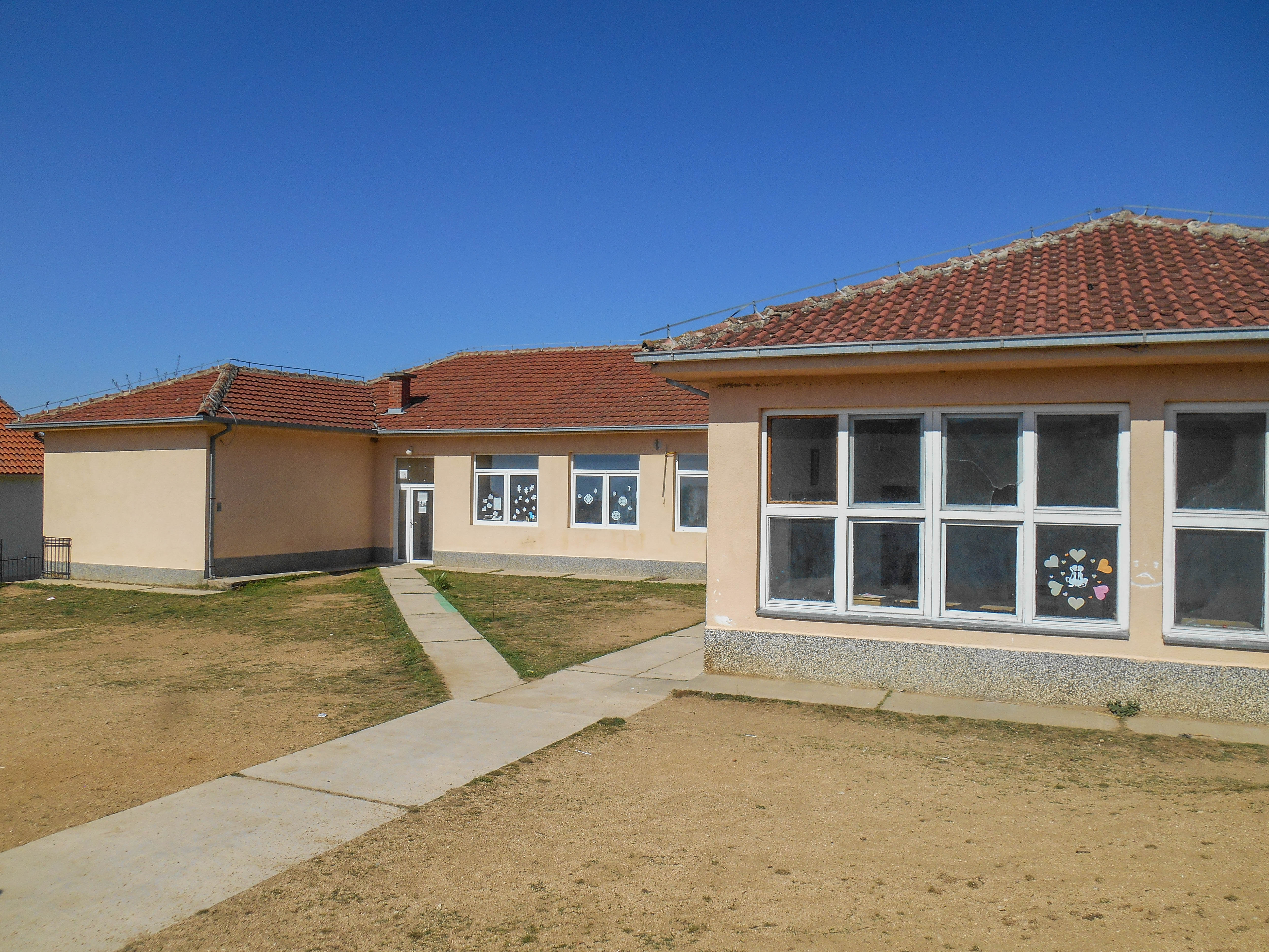 Основно училиште „Гоце Делчев“ - Дрвош